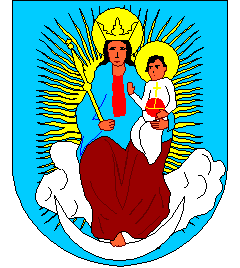 Herb miasta Jaryczów Nowy